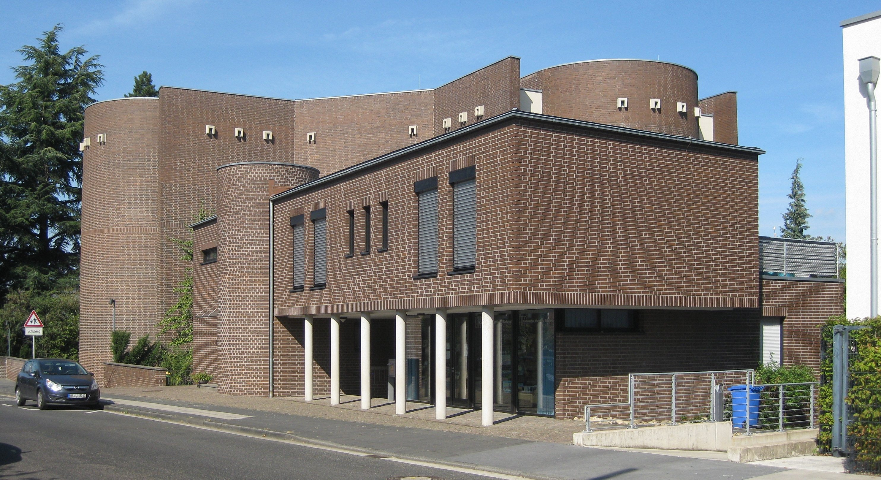 Die katholische Pfarrkirche „Heilig Kreuz“ in Limperich, Bonn-Beuel; GemeindebüchereiThis is a photograph of an architectural monument., no. A 3931